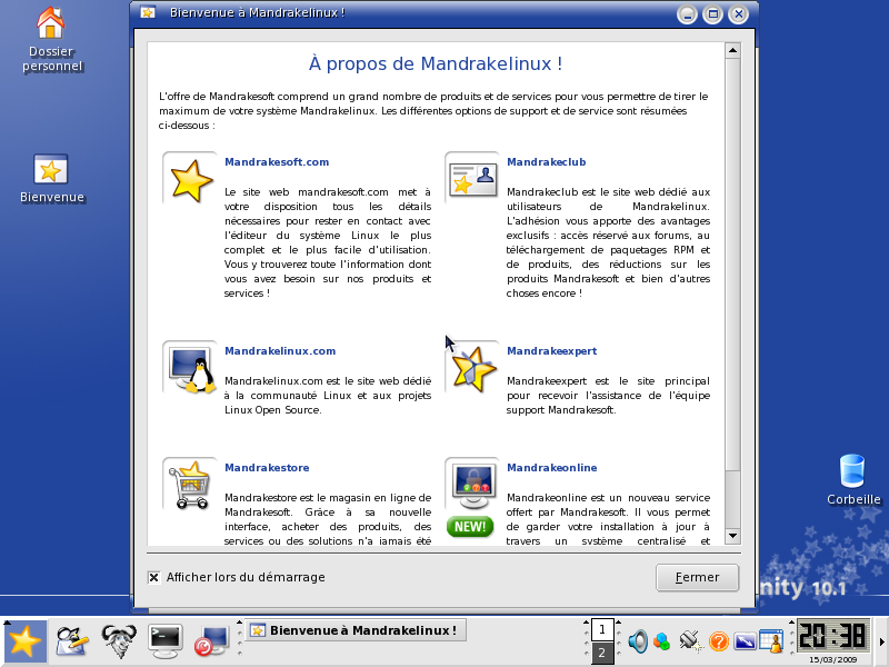 Premier écrans après installation